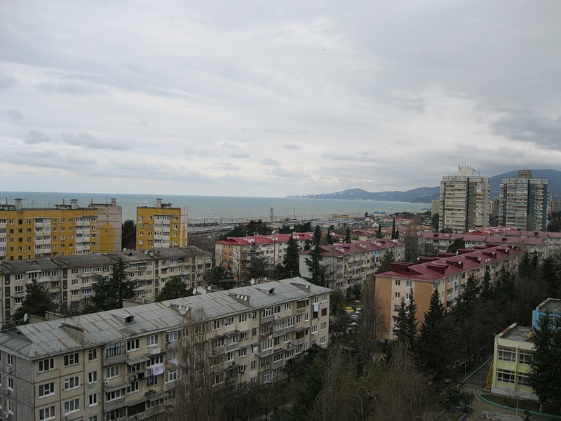 Микрорайон Голубые Дали в Адлере